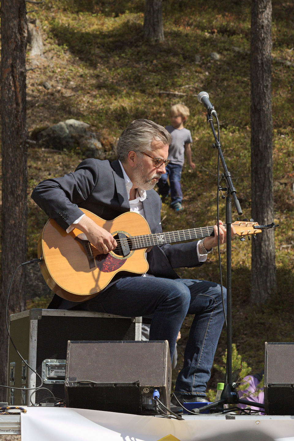 Johan Norberg under invigningen av Björnlandets utvidgade nationalpark